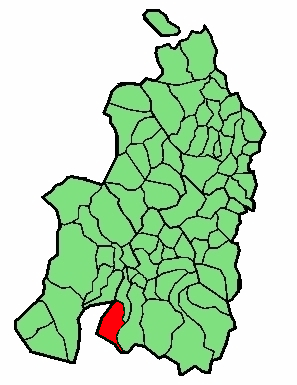 aipaturiko udalerriaren kokapena Nafarroa Beherean